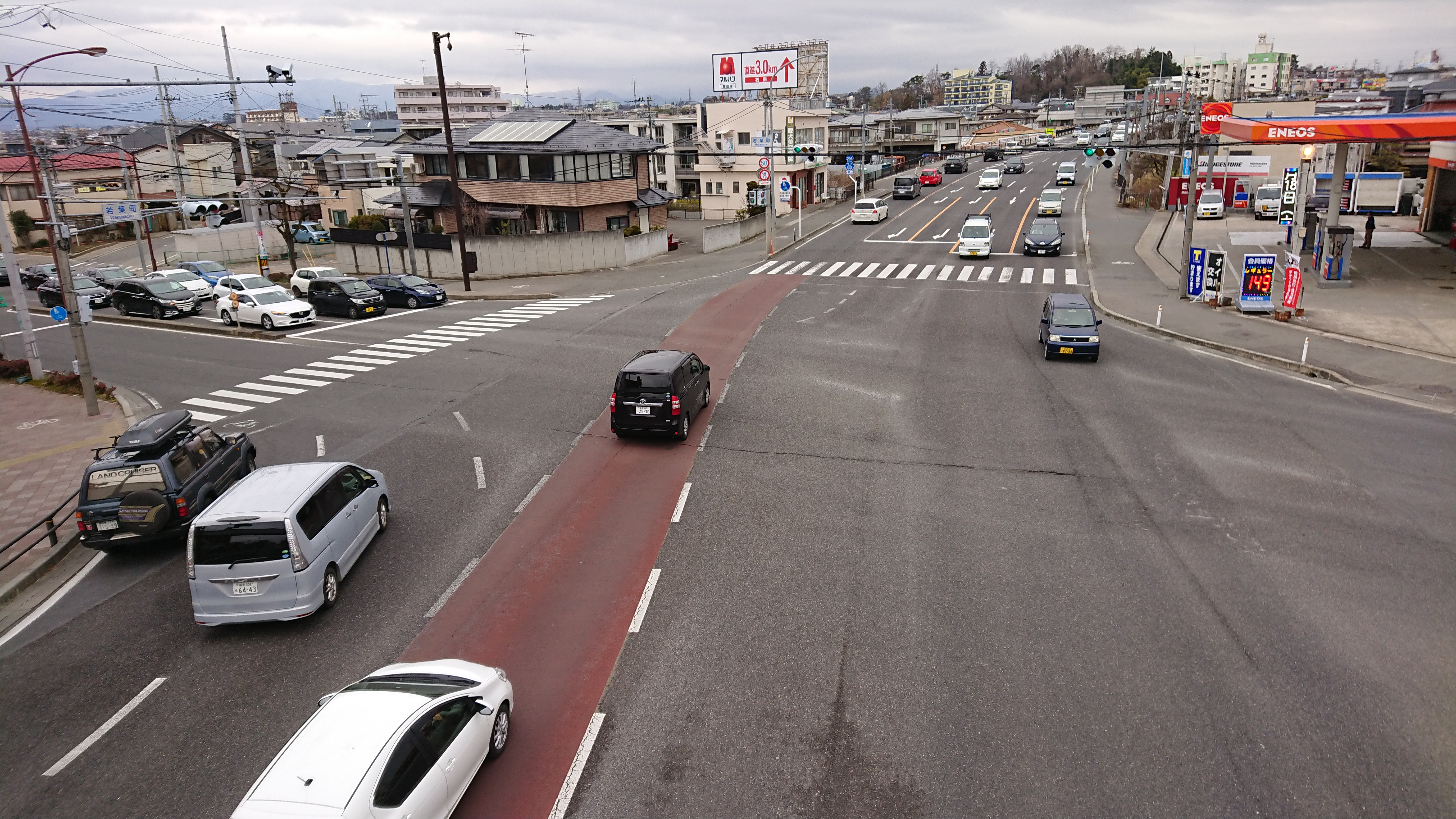 上：福島県道296号、下：福島県道57号・296号重用、左：うねめ通り、右：福島県道57号